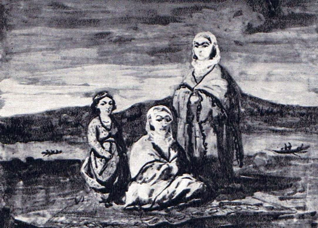 Turcoaice pe covor